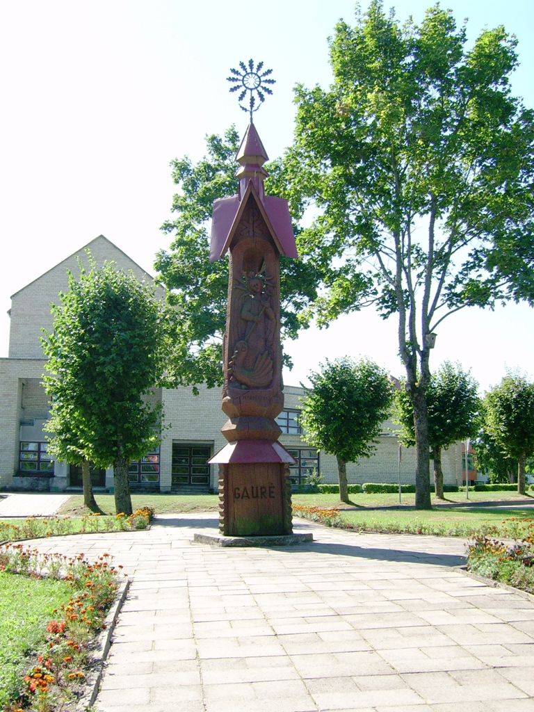 Gaurės stogastulpis